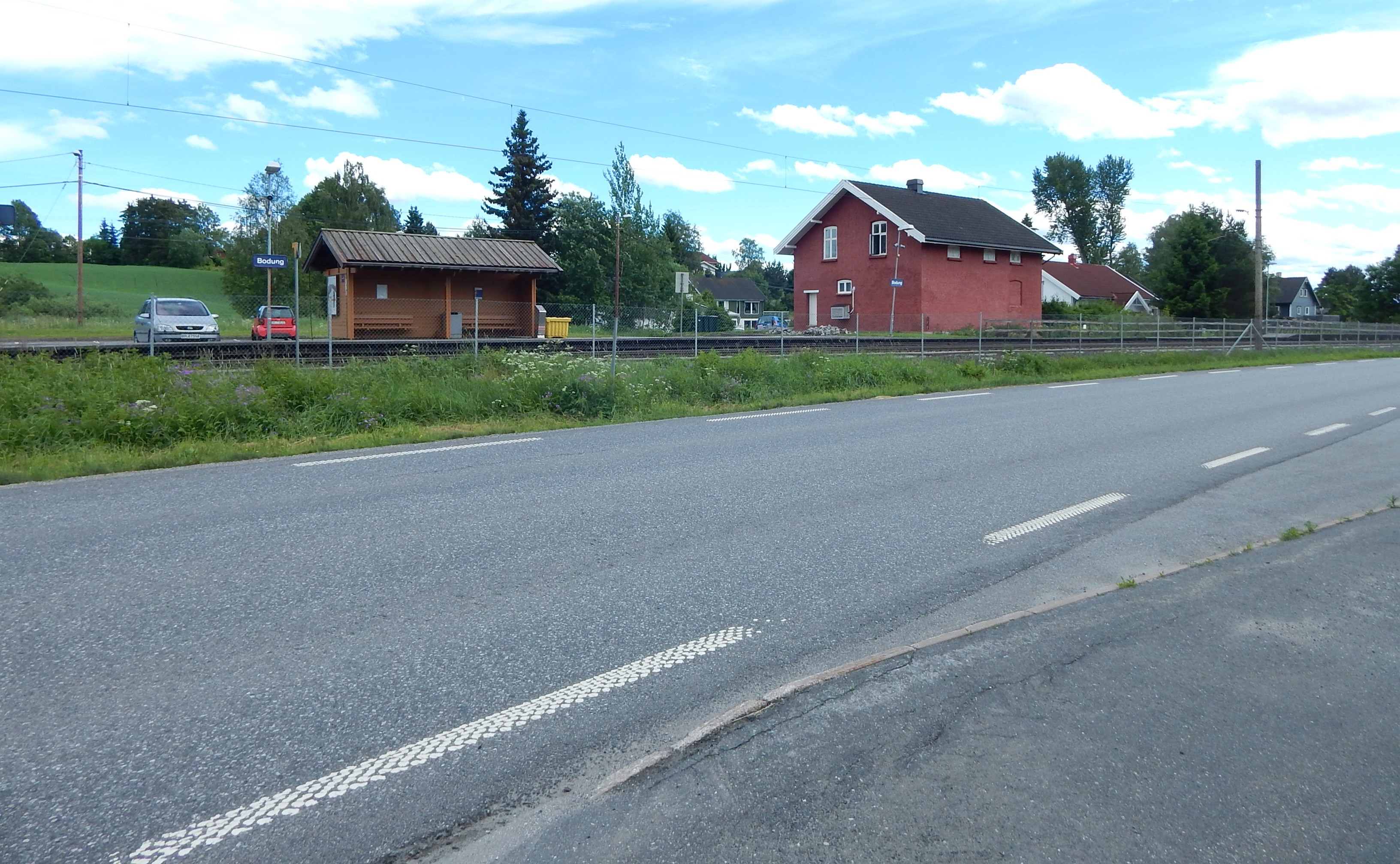 Bodung holdeplass på Kongsvingerbanen med Nedre Hagaveg (fylkesvei 175) i forgrunnen